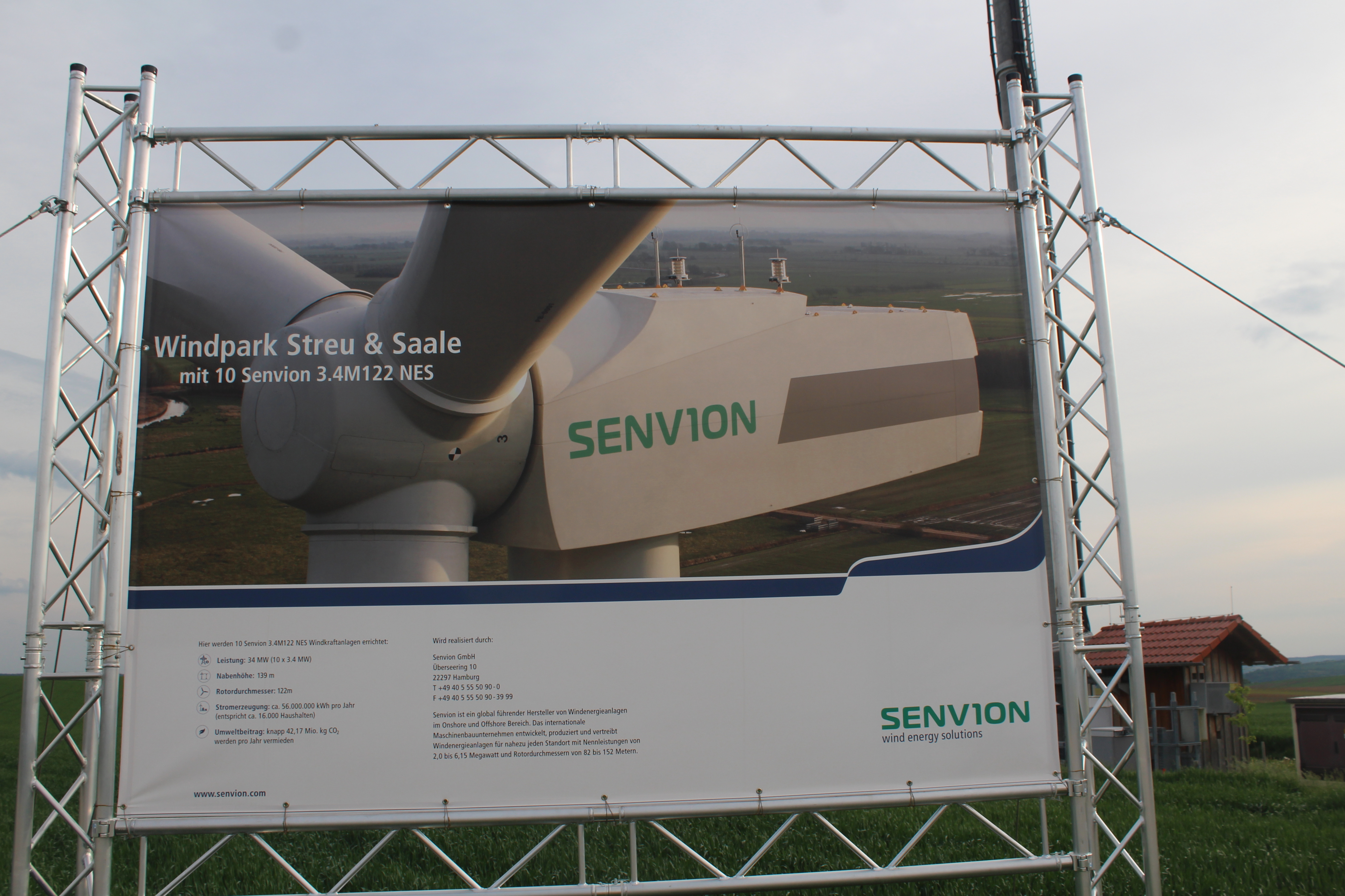 Informationstafel Windpark Strut und Saale